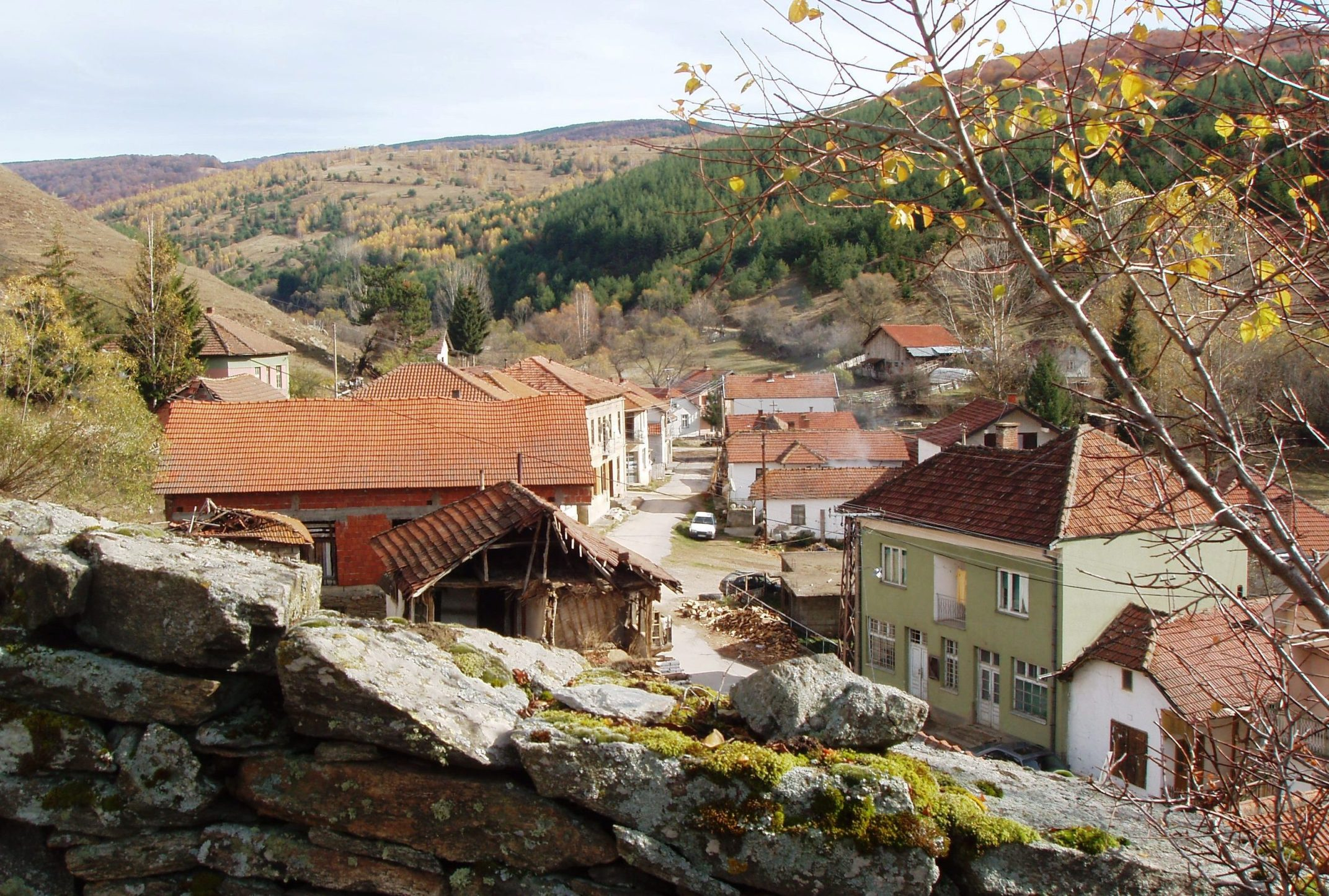 Божица